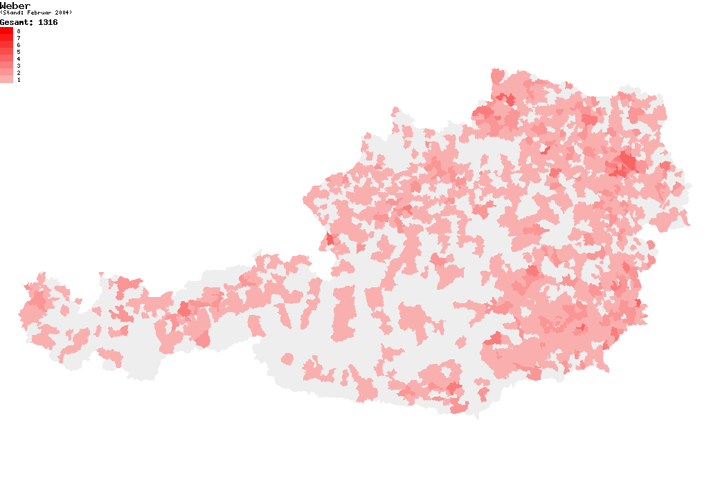 Verteilung des Nachnamens Weber in Österreich nach dem Telefonbuch mit Stand vom Februar 2004